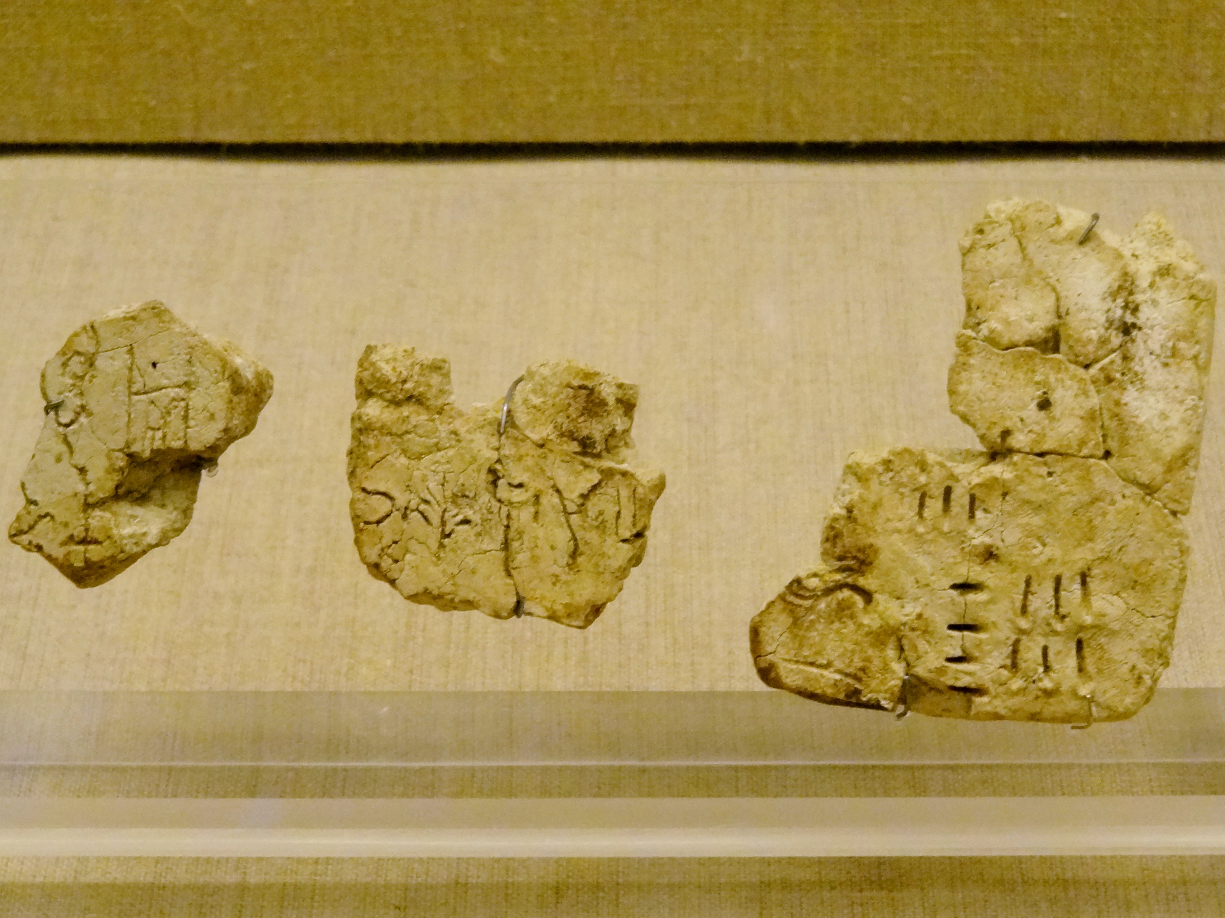 Tontafeln mit Linearschrift A (17. Jahrhundert v. Chr.) aus der Ausgrabungsstätte bei Akrotiri (Santorin) im Prähistorischen Museum von Thira, Santorin (Thira), Kykladen, Griechenland